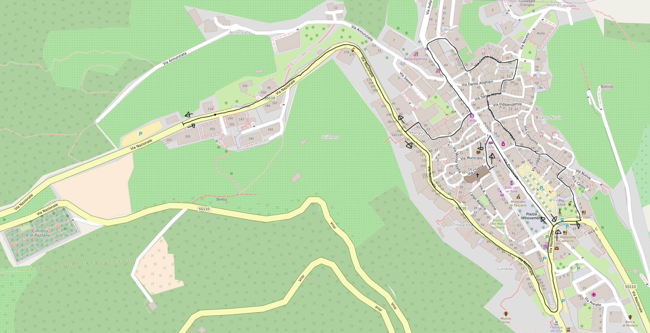 Carta con percorso della domenica pomeriggio Processione del Santo Salvatore Festa del Santo Salvatore a Pazzano Carta creata nel 2016